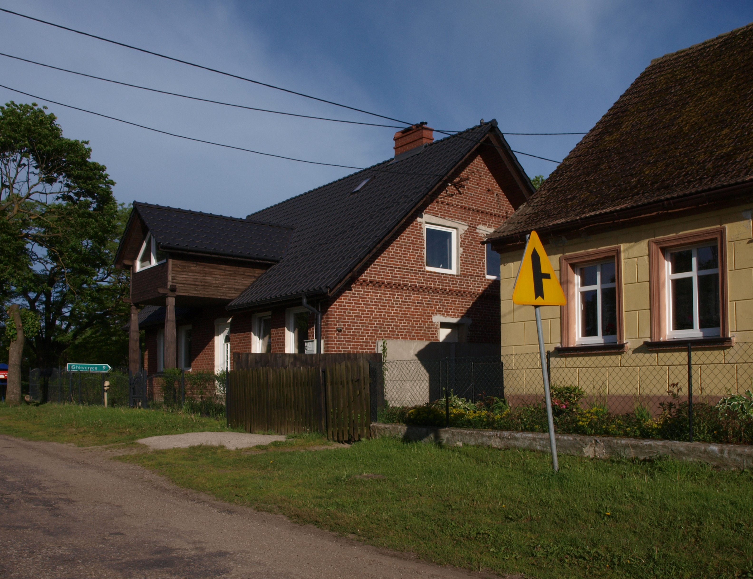 Budynki w Izbicy, w województwie pomorskim.